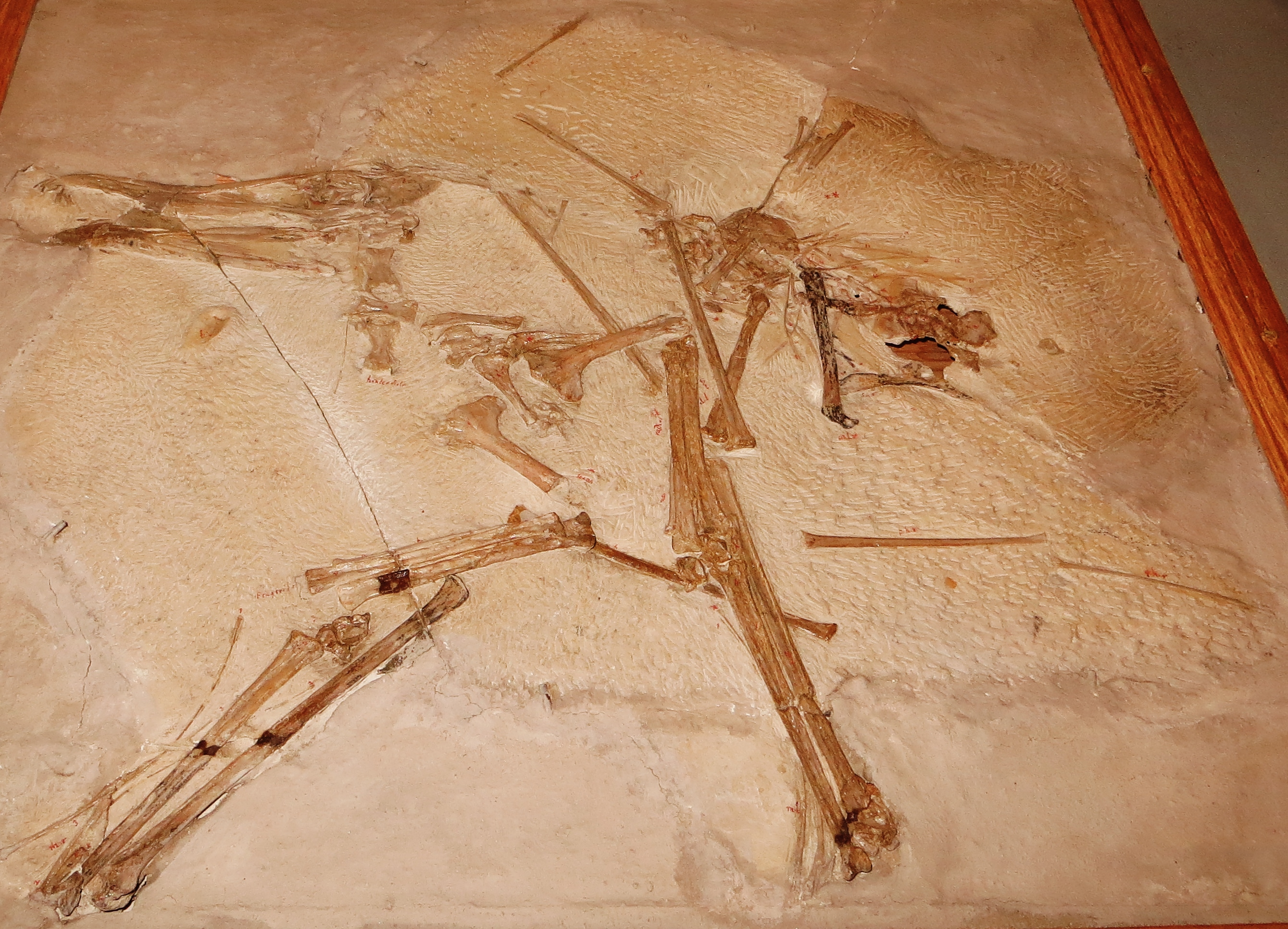 Fossil of Cycnorhamphus, an extinct reptile - Took the picture at Museum of Paleontology, Tuebingen